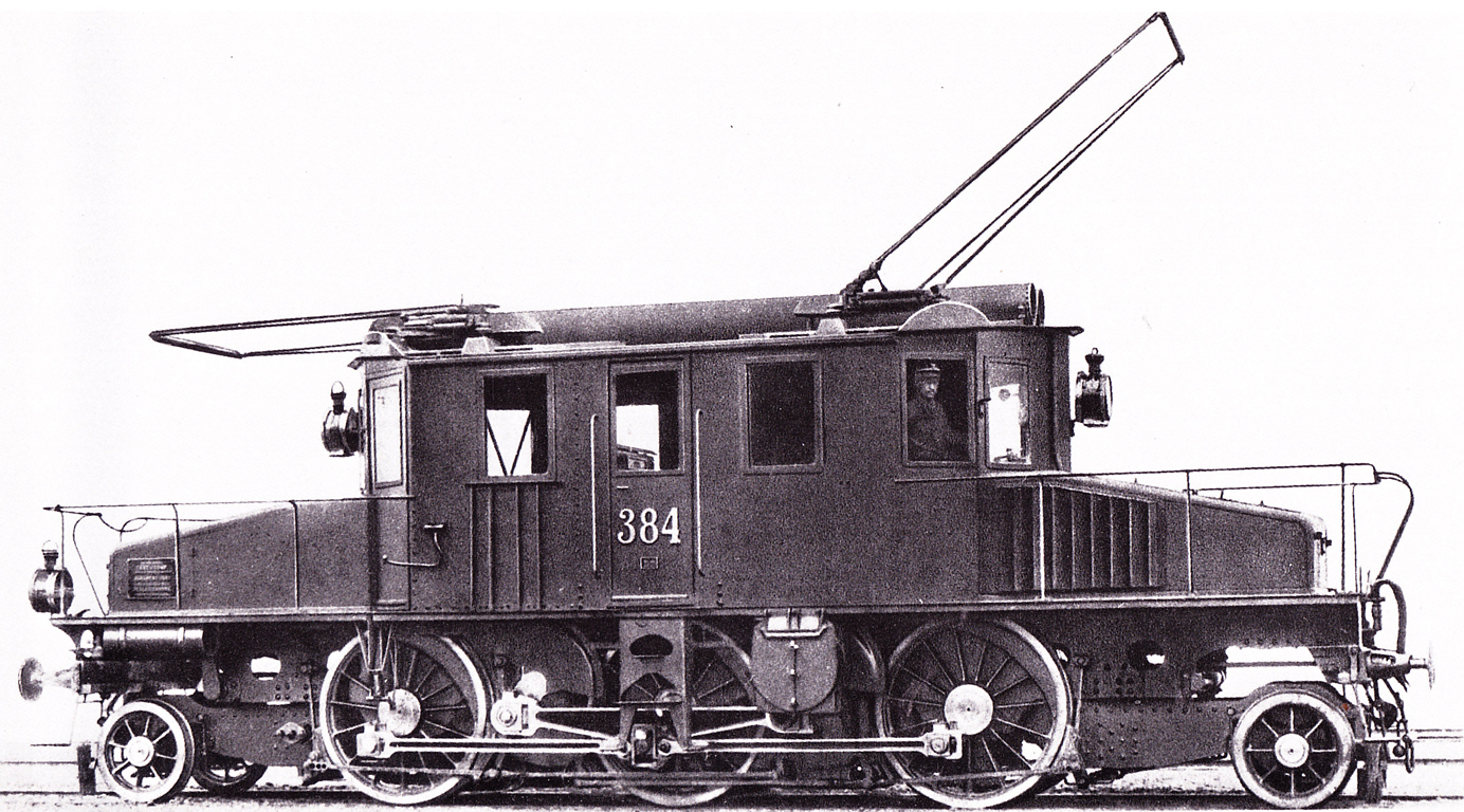 Locomotiva elettrica trifase n. 384 (gruppo E.380) delle Ferrovie dello Stato.